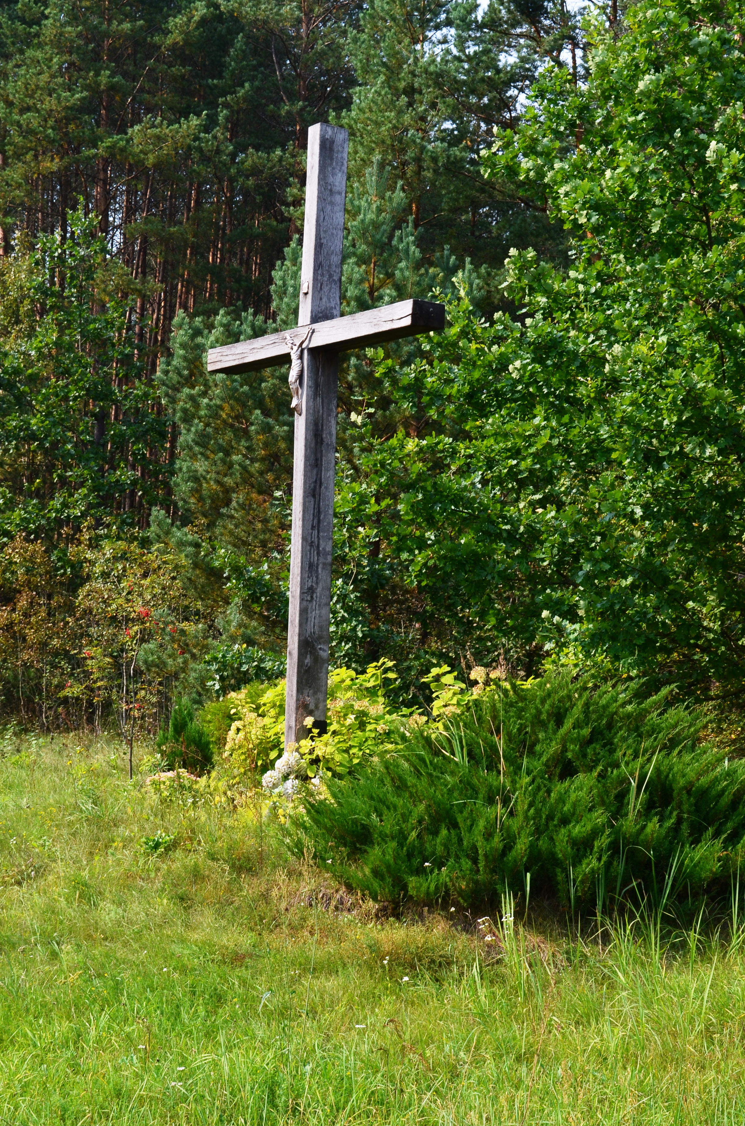 Milašinės k. kryžius, Mickūnų sen., Vilniaus raj.